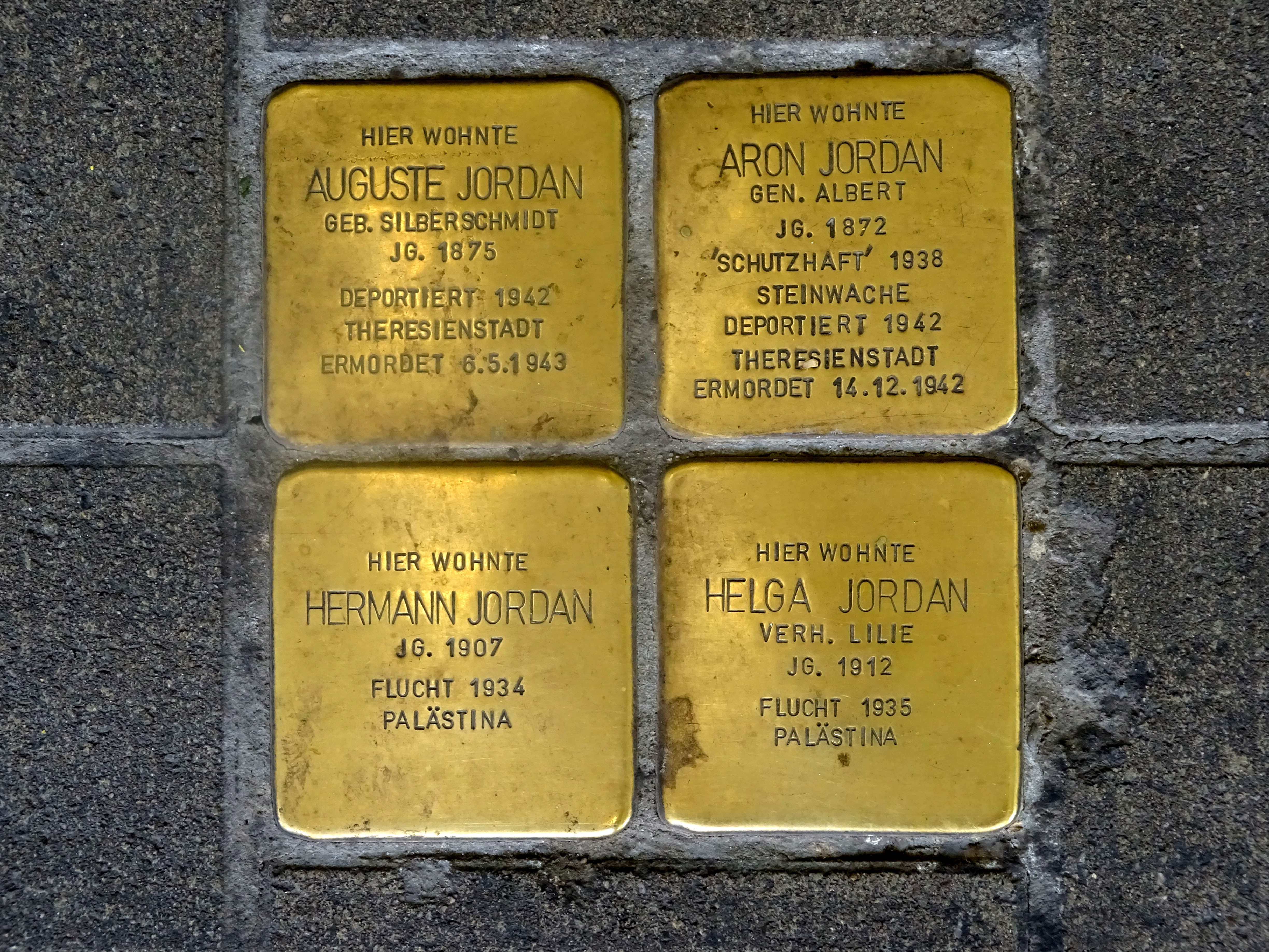 Stolpersteine für Fam. Jordan am Haus Rheinische Str. 56 in Dortmund